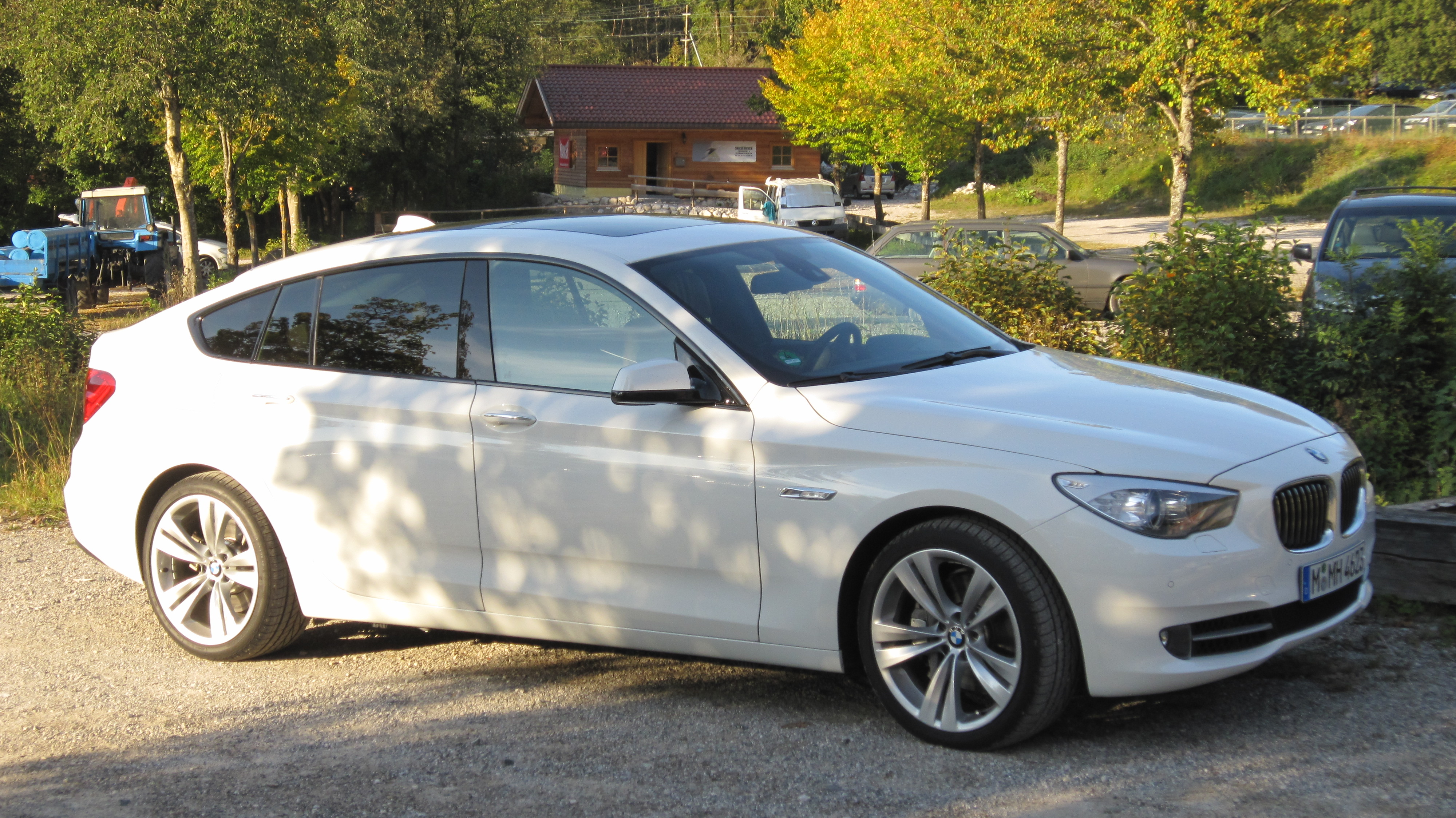 BMW Série 5 GT